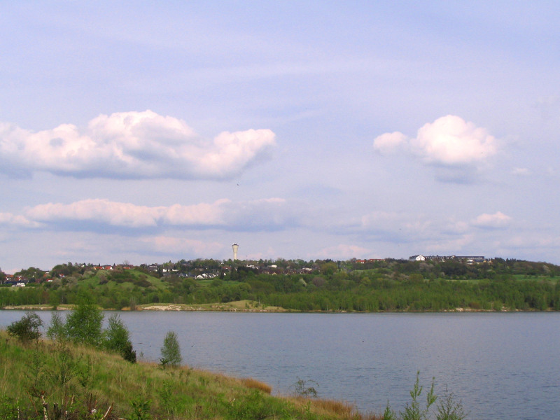 Blick über den Borkener See auf Borken